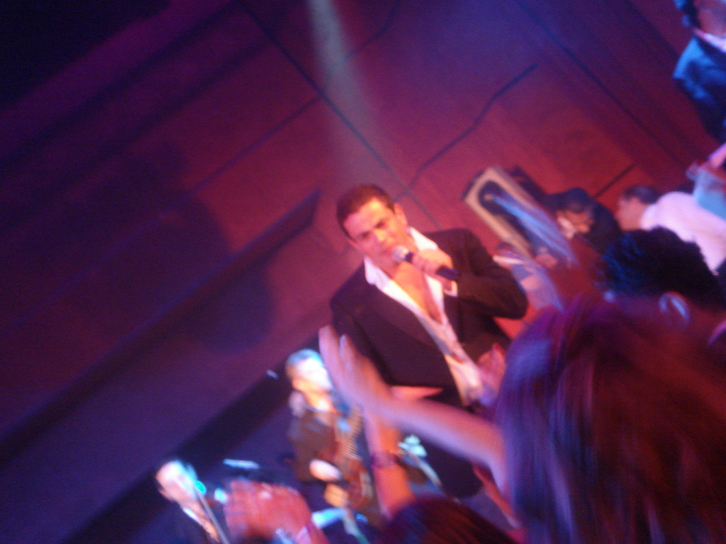 Singer Amr Diab